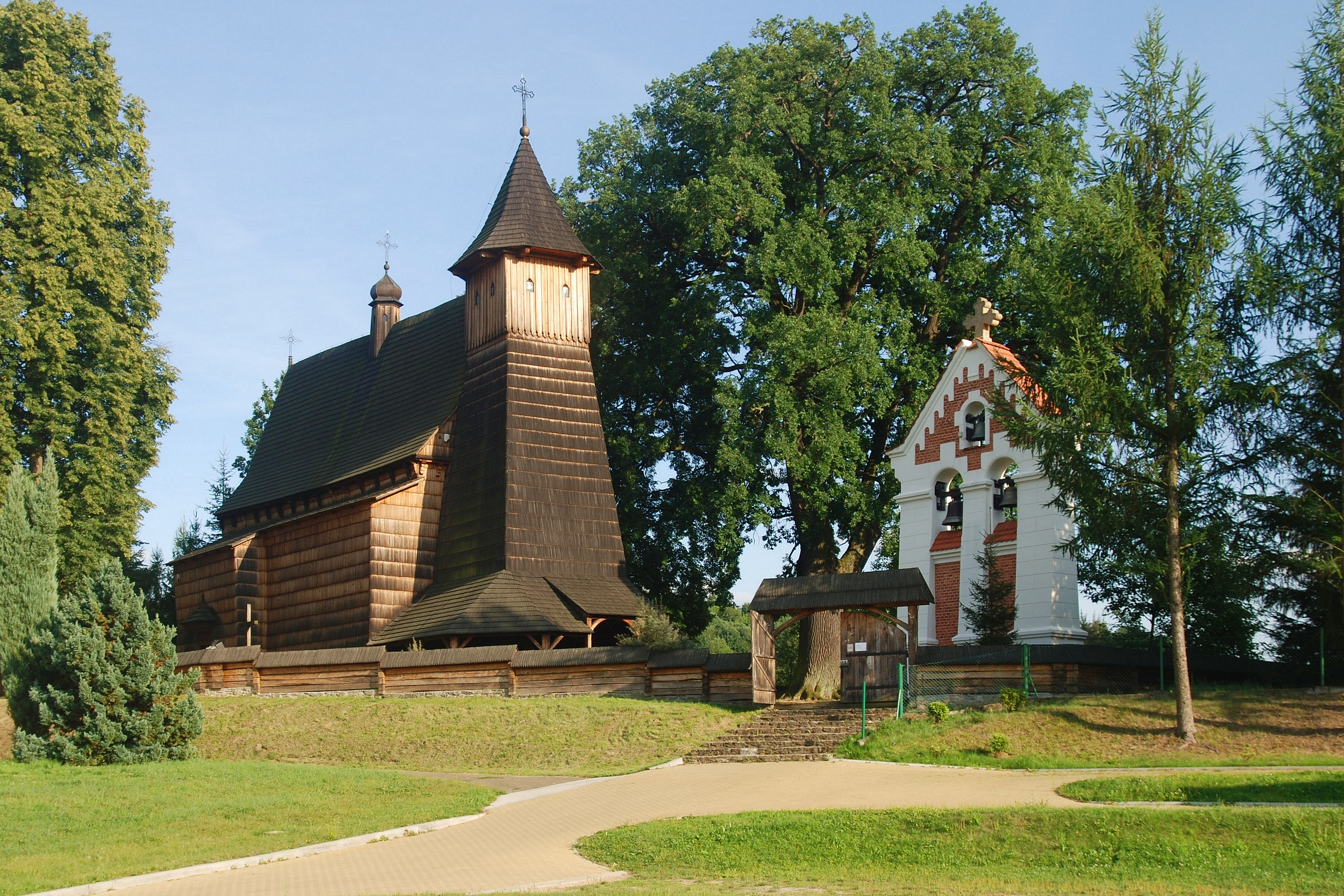 kosciol